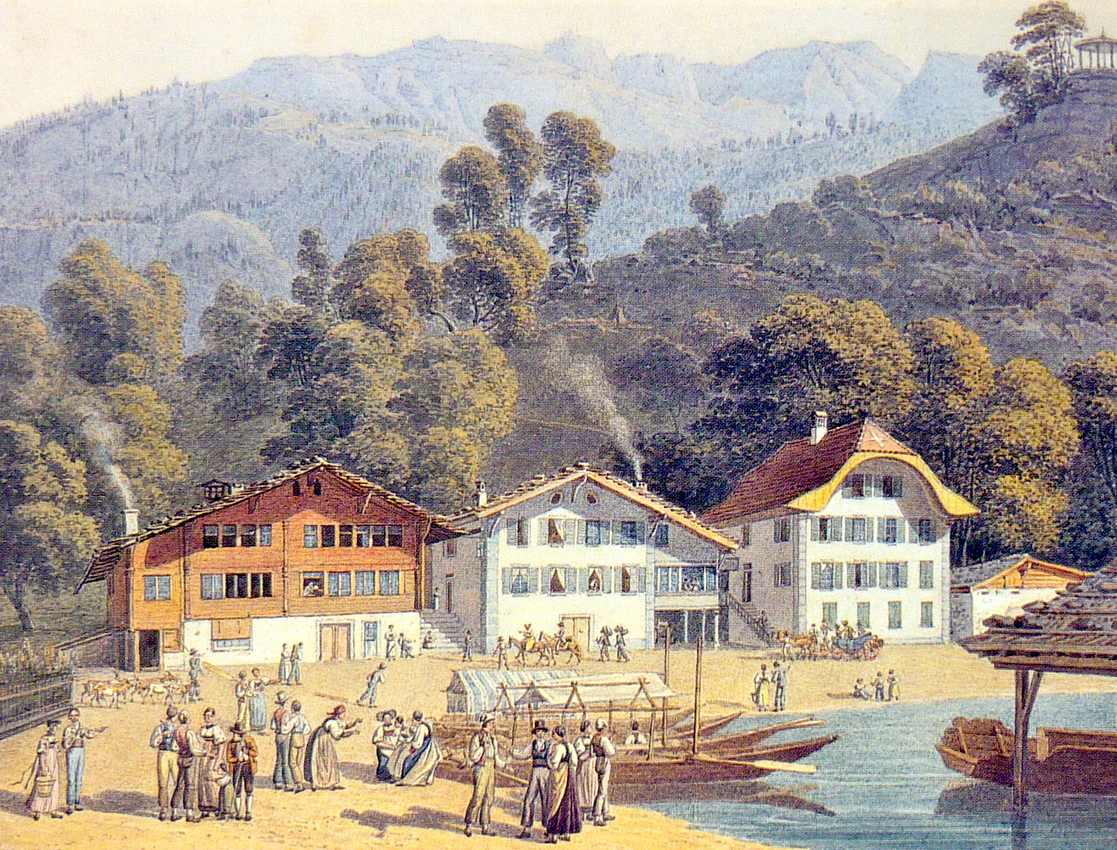 Herbergen in Tracht östl. Brienz